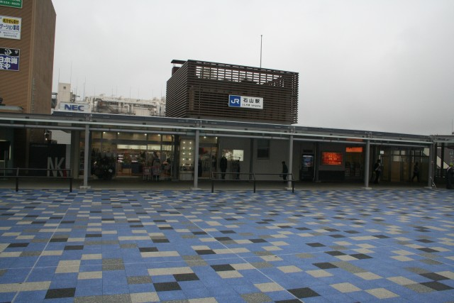 石山駅(2006/10/02)